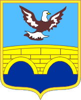 Герб города Благодарный Ставропольского края, утверждённый 2 марта 2000 года решением Благодарненского Совета народных депутатов от 2 марта 2000 года № 131 «Об утверждении герба муниципального образования город Благодарный»